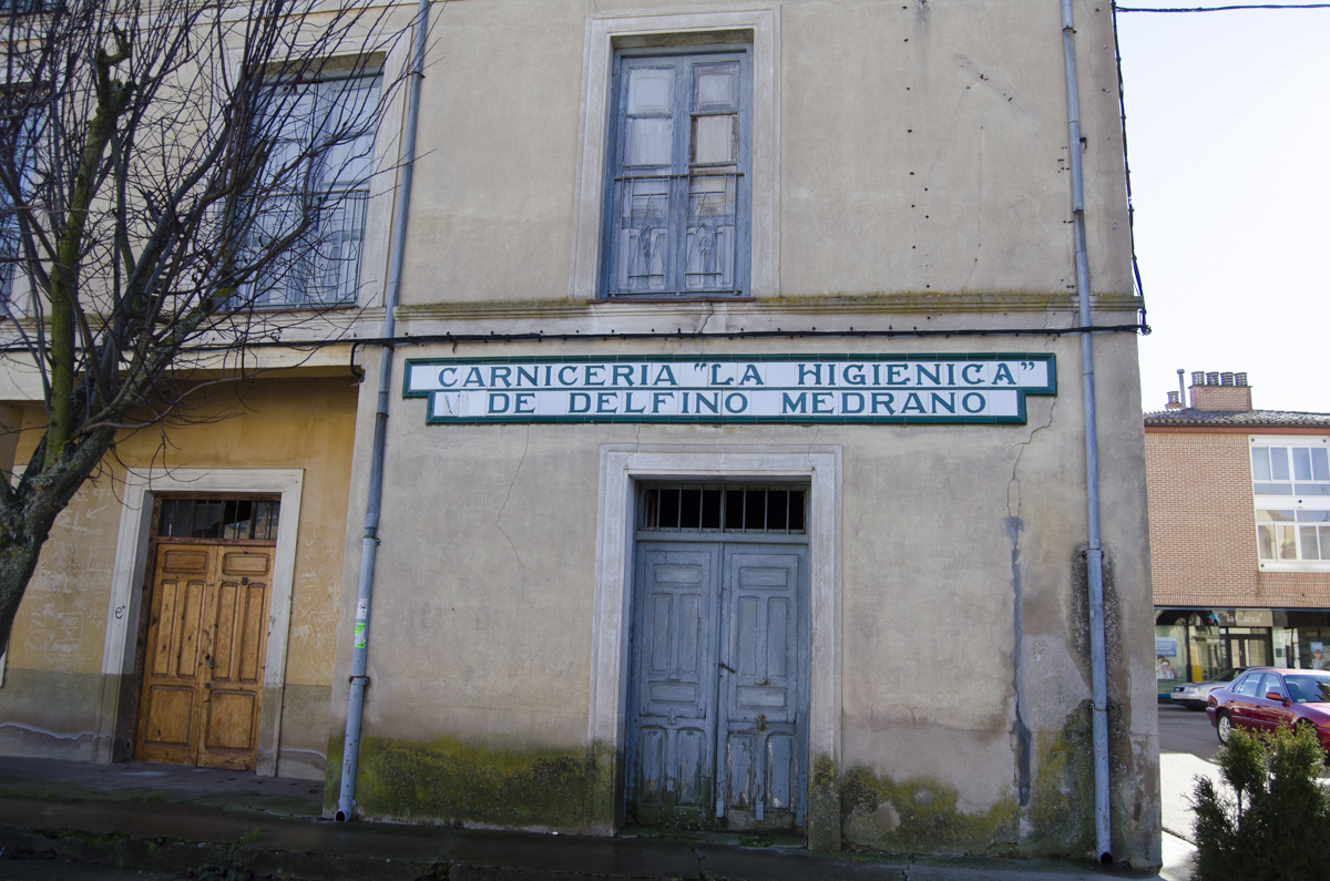 Alar del Rey. Fachada de la antigua carnicería "La Higiénica"